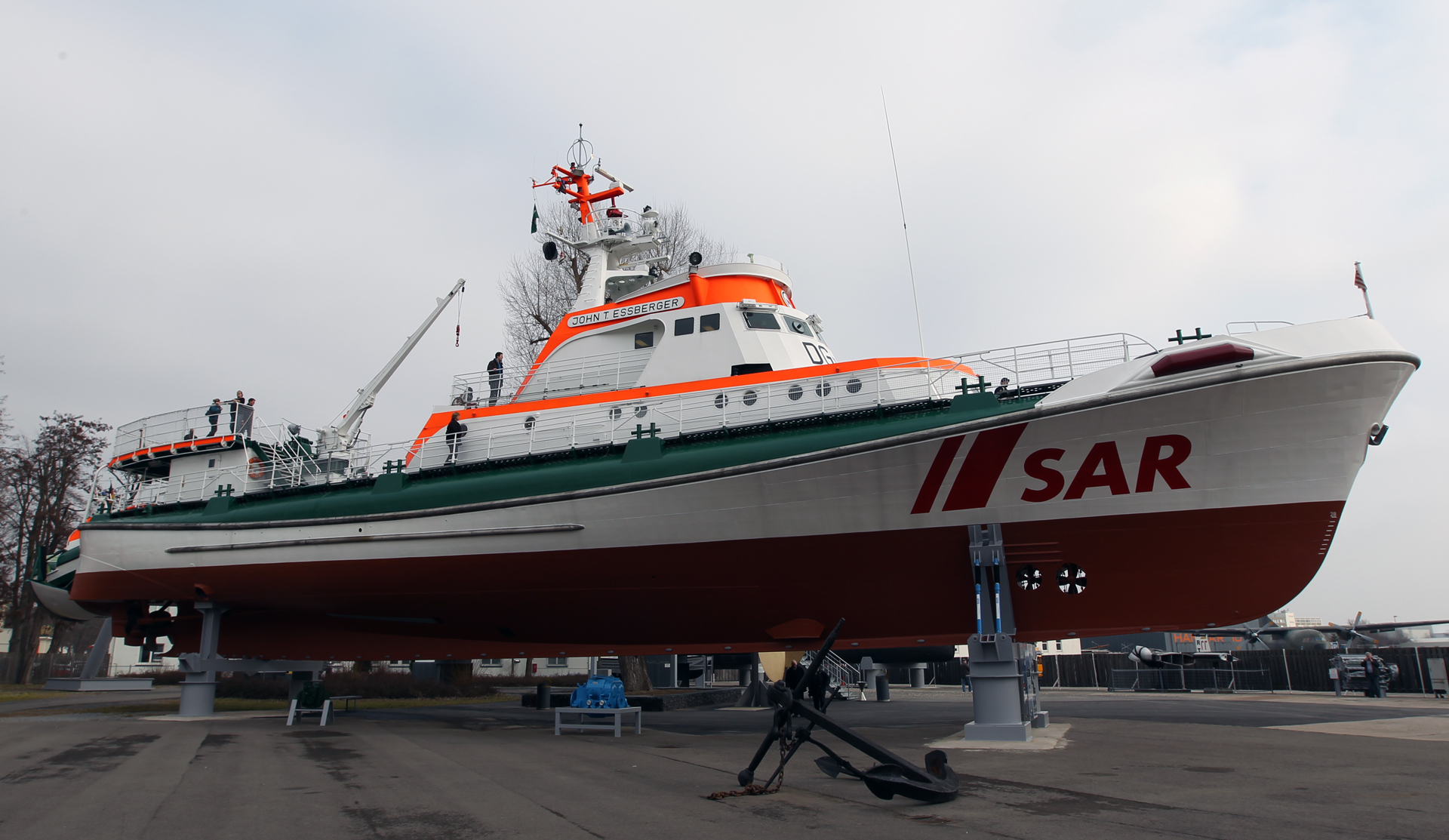 Die John T Esserberger als Exponat im Technikmuseum Speyer